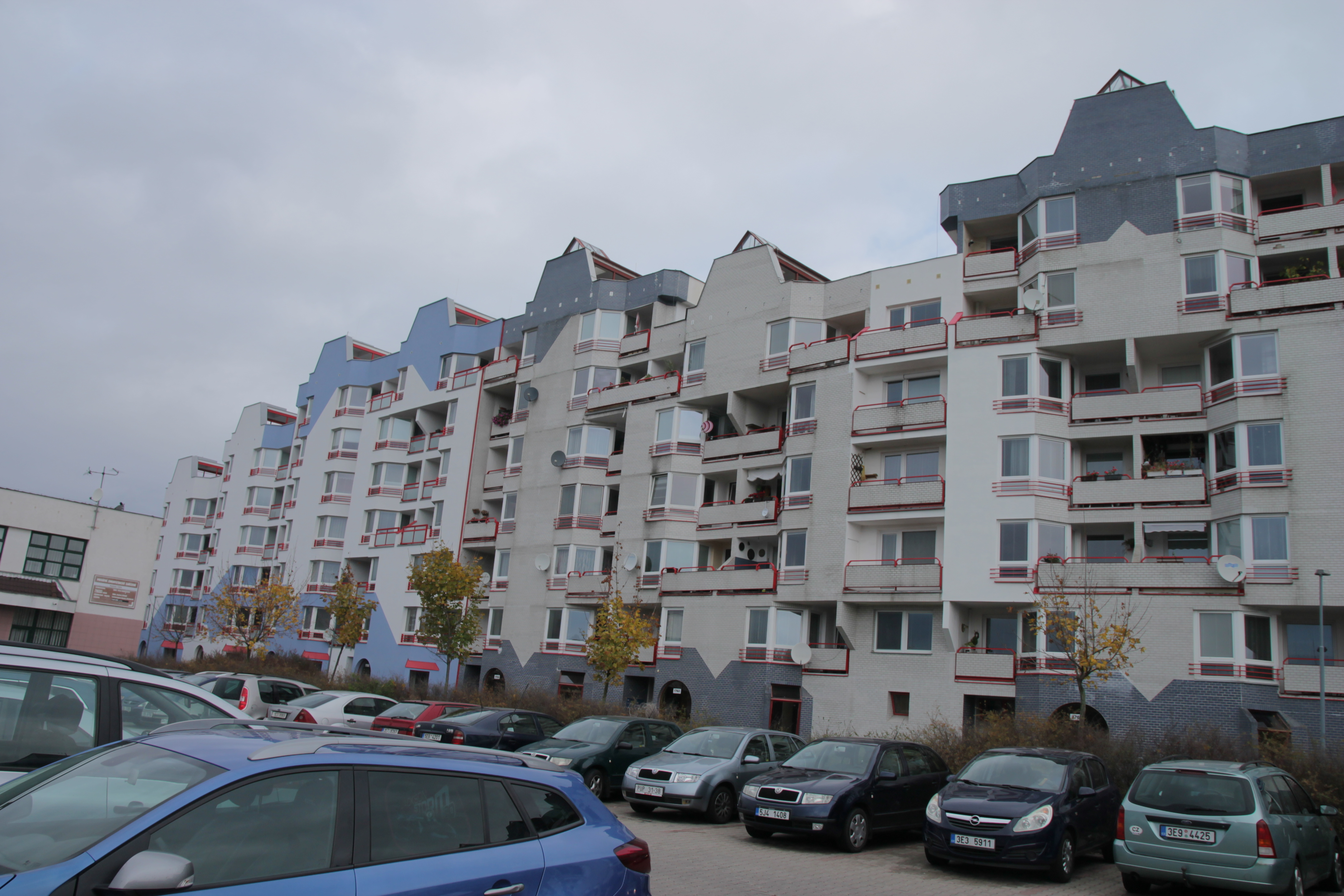 Panelový dům v Dašické ulici v Pardubicích